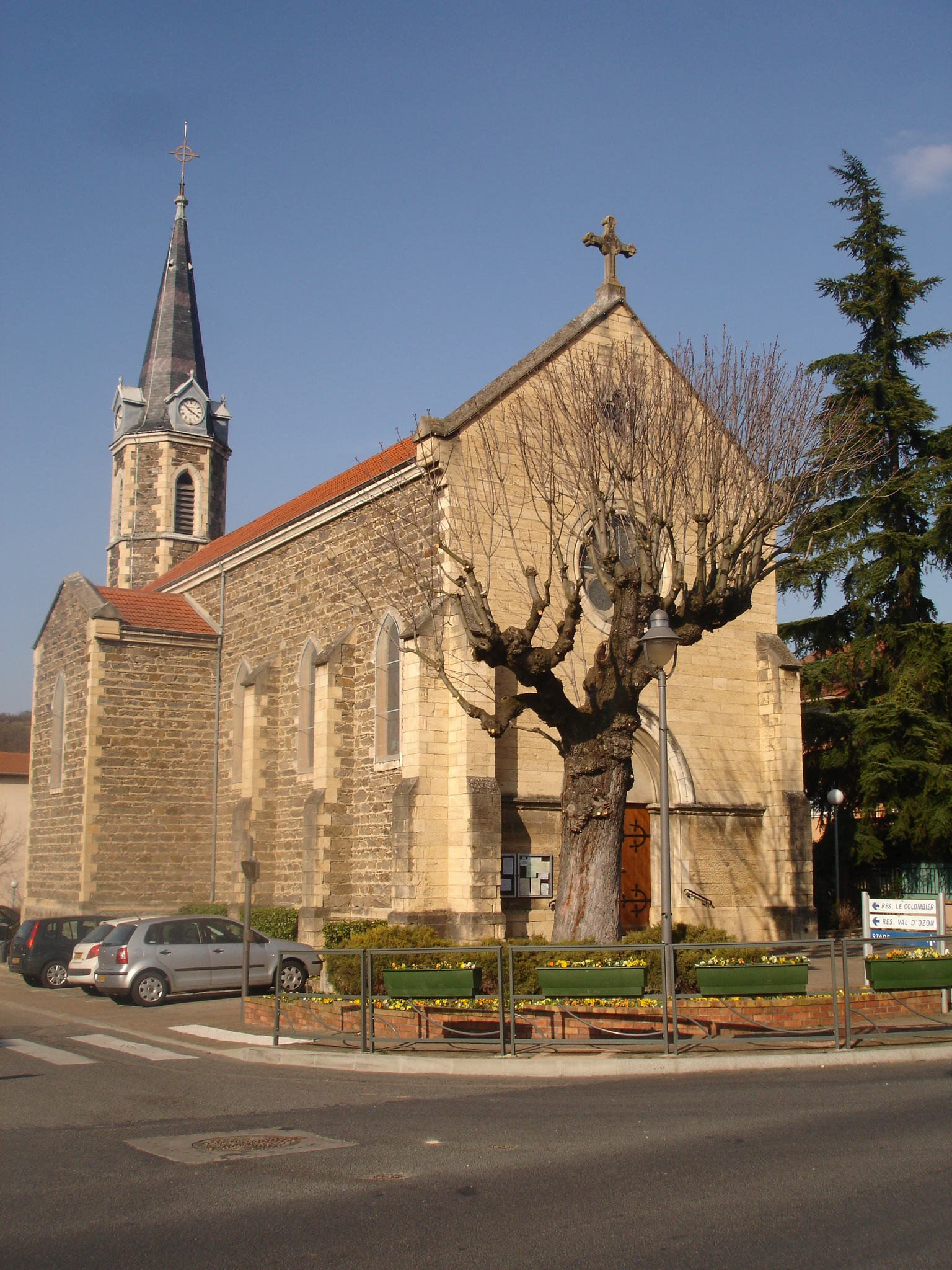 Sérézin-du-Rhône : l'église vue de face